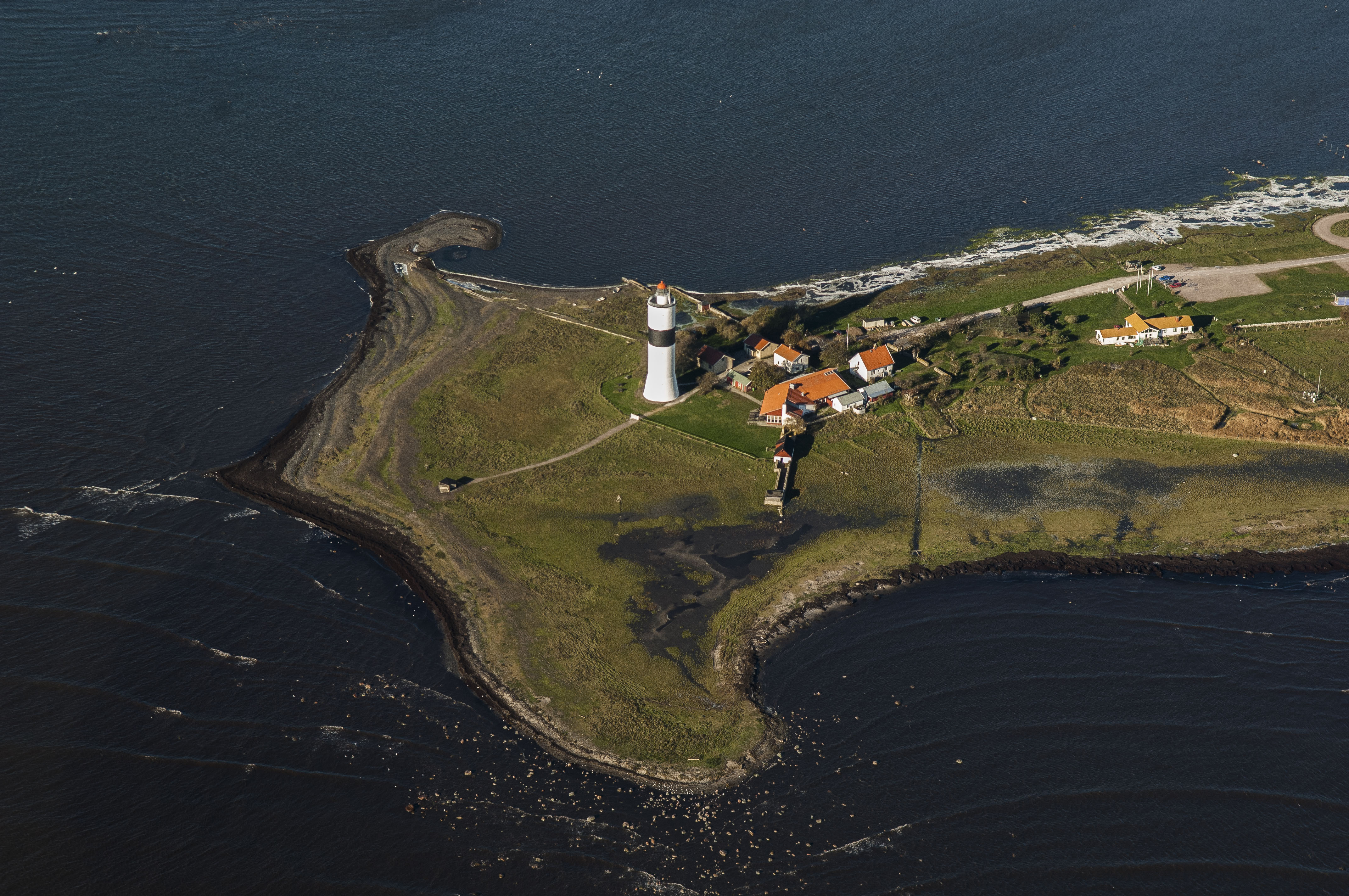 Ottenby fågelstation till vänster i bild